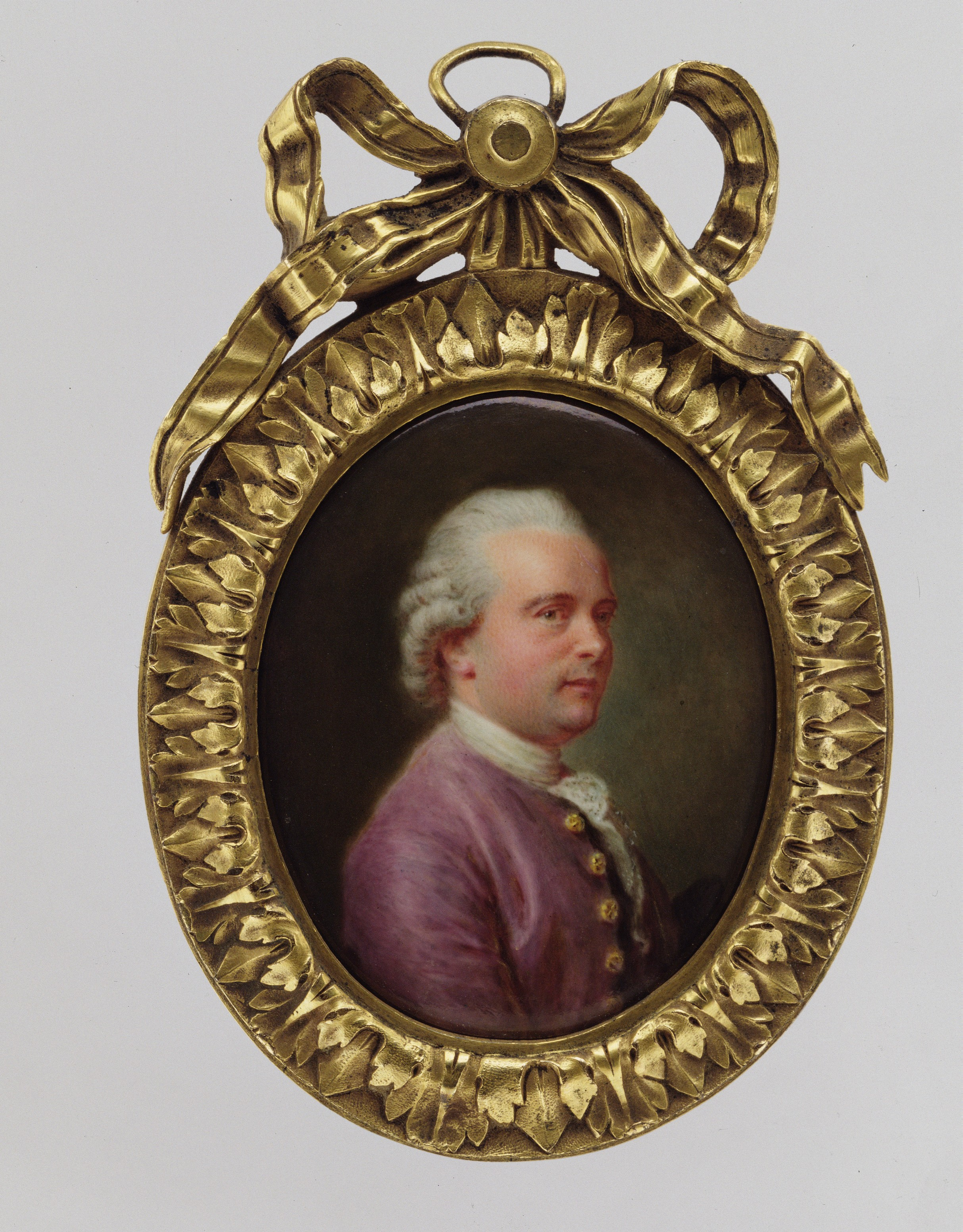 Painting, miniature; Miniatures